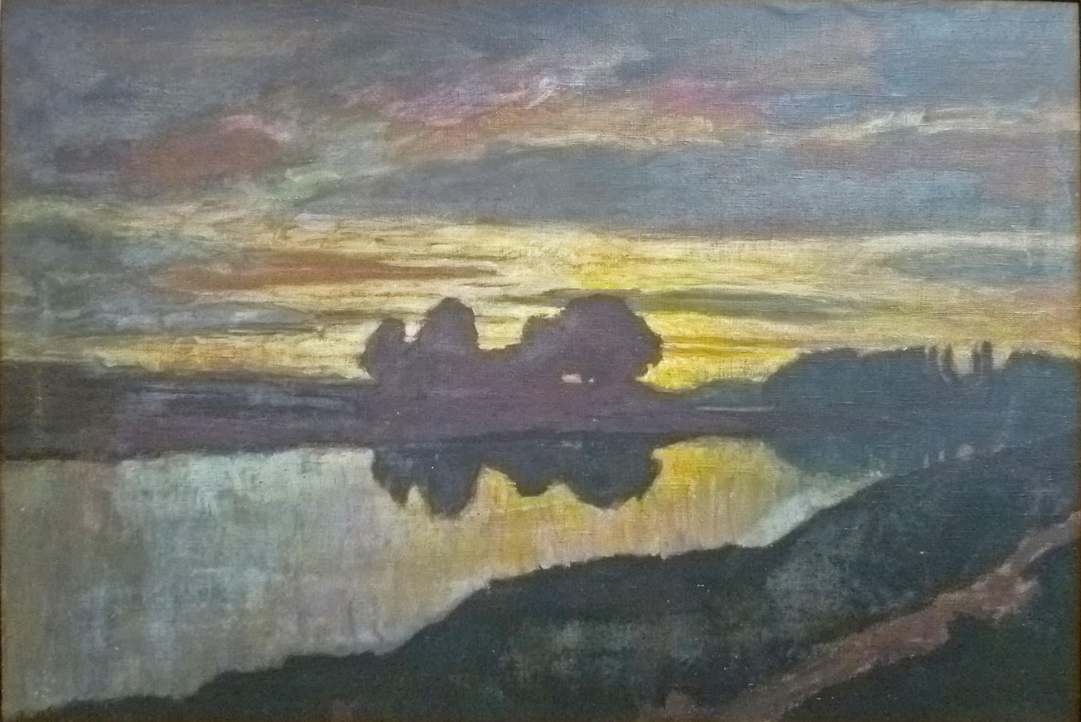 "Landschap" (1921), olieverf op doek (65 x 95 cm) door Pierre Abattucci (1871-1942); privécollectie